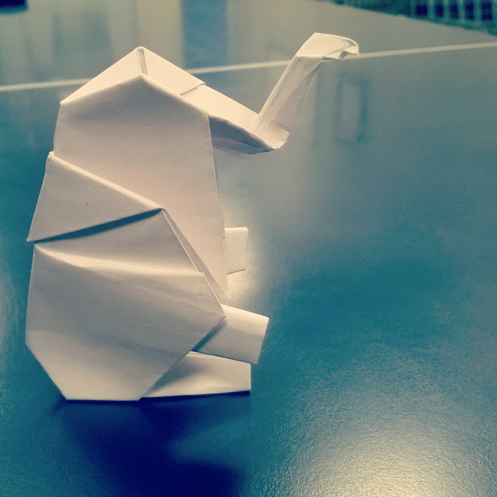 ഒറിഗാമി രീതിയിൽ ഉണ്ടാക്കിയ ആന, ഉപയോഗിച്ചിരിക്കുന്നത് A4 അളവിലുള്ള പേപ്പർ ആണ്.